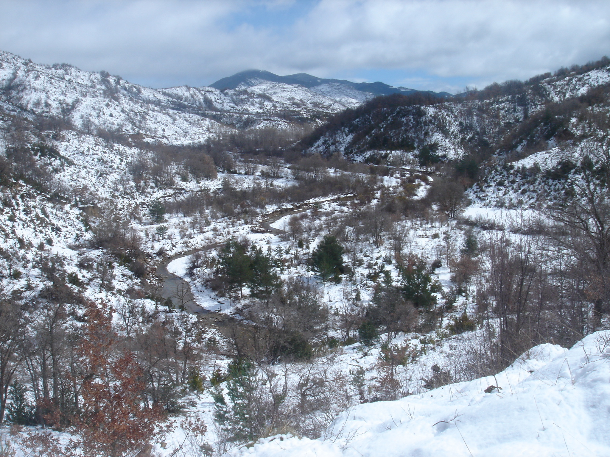 El río Onsella una vez pasa por el pueblo de Longás discurriendo por La Valdonsella